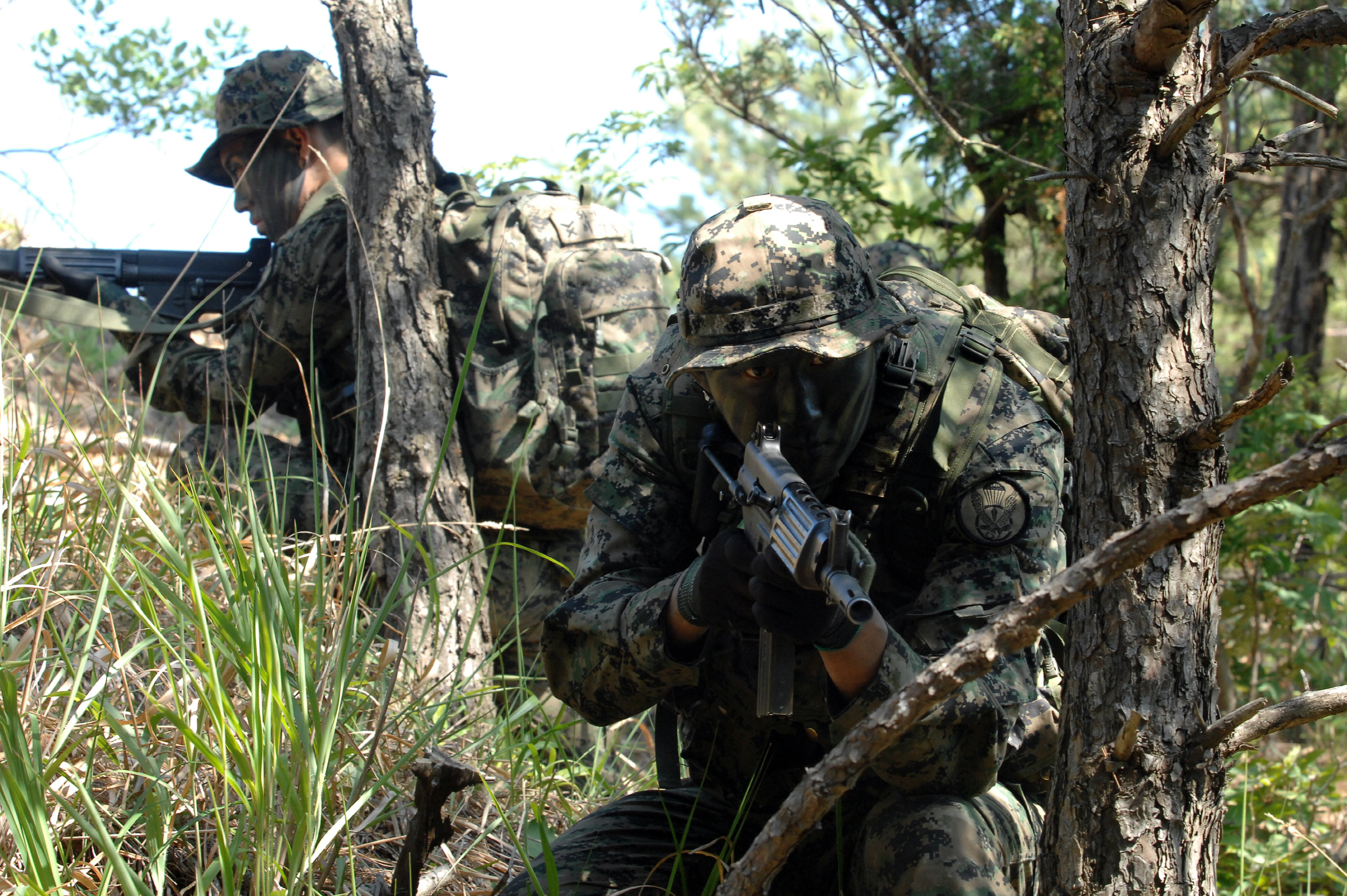 촬영 : 임영식